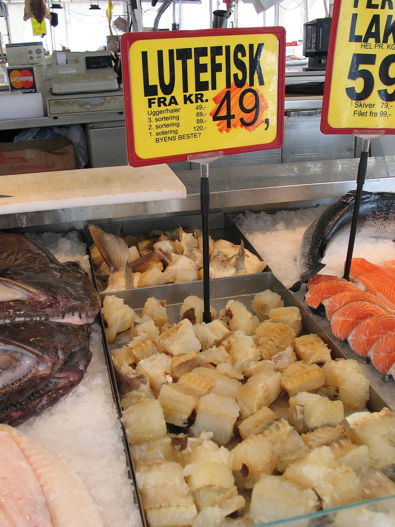 Lutefisk